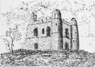 Guzara